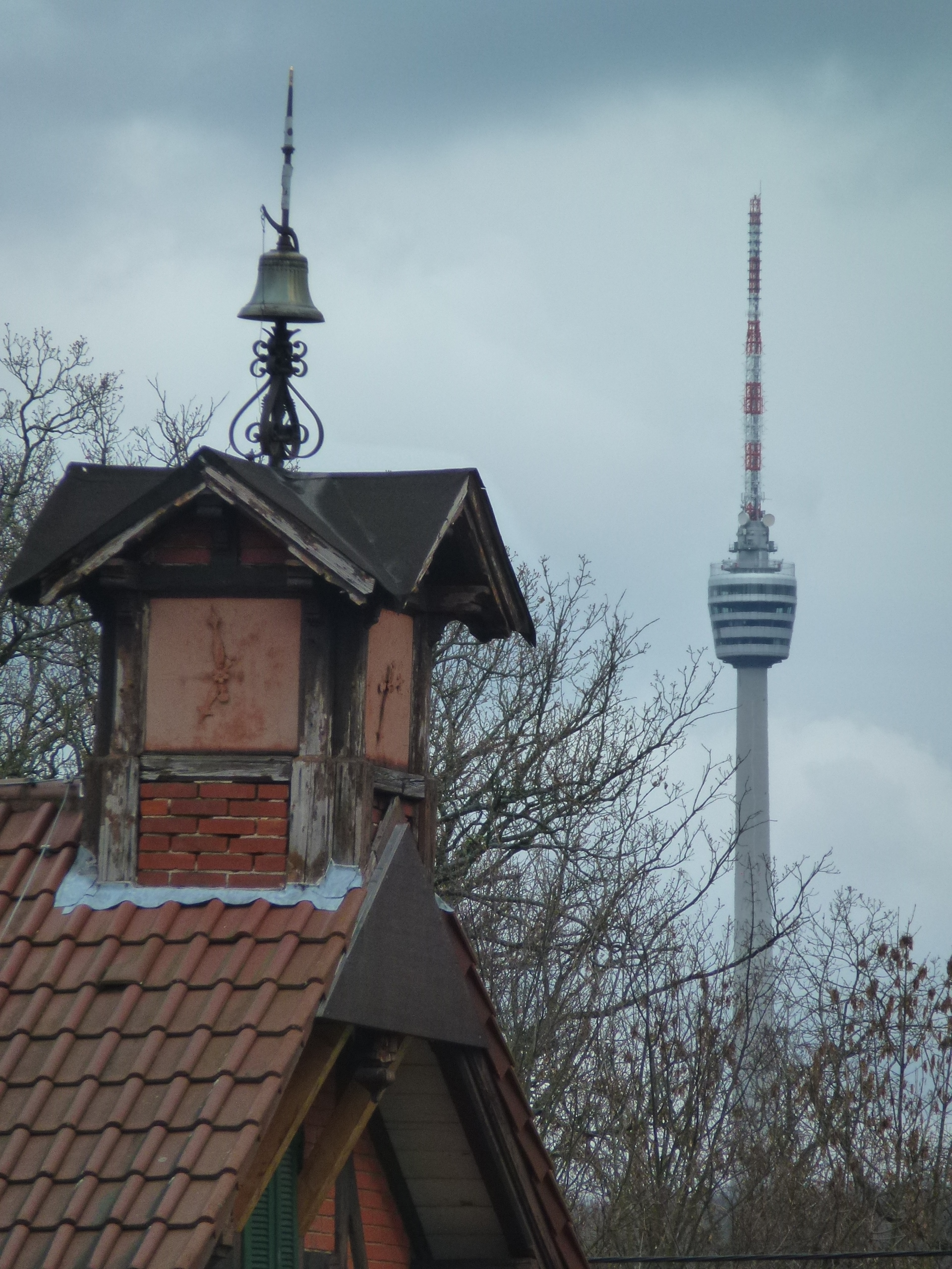 Uhrenturm mit Sturmglocke des Garnisonsschützenhauses in Stuttgart-Degerloch.